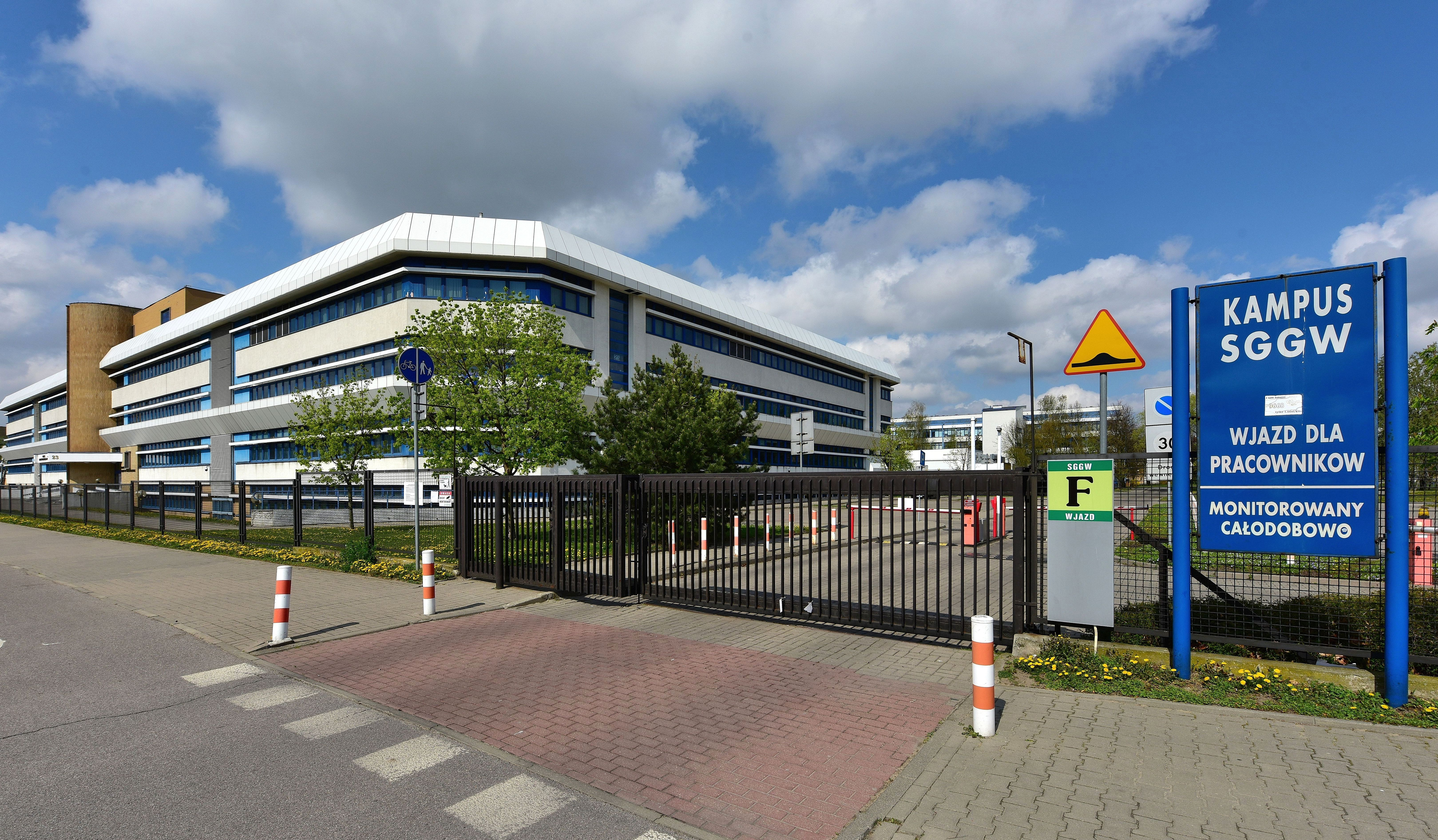 Fragment kampusu SGGW w Warszawie, widok od strony ul. Ciszewskiego